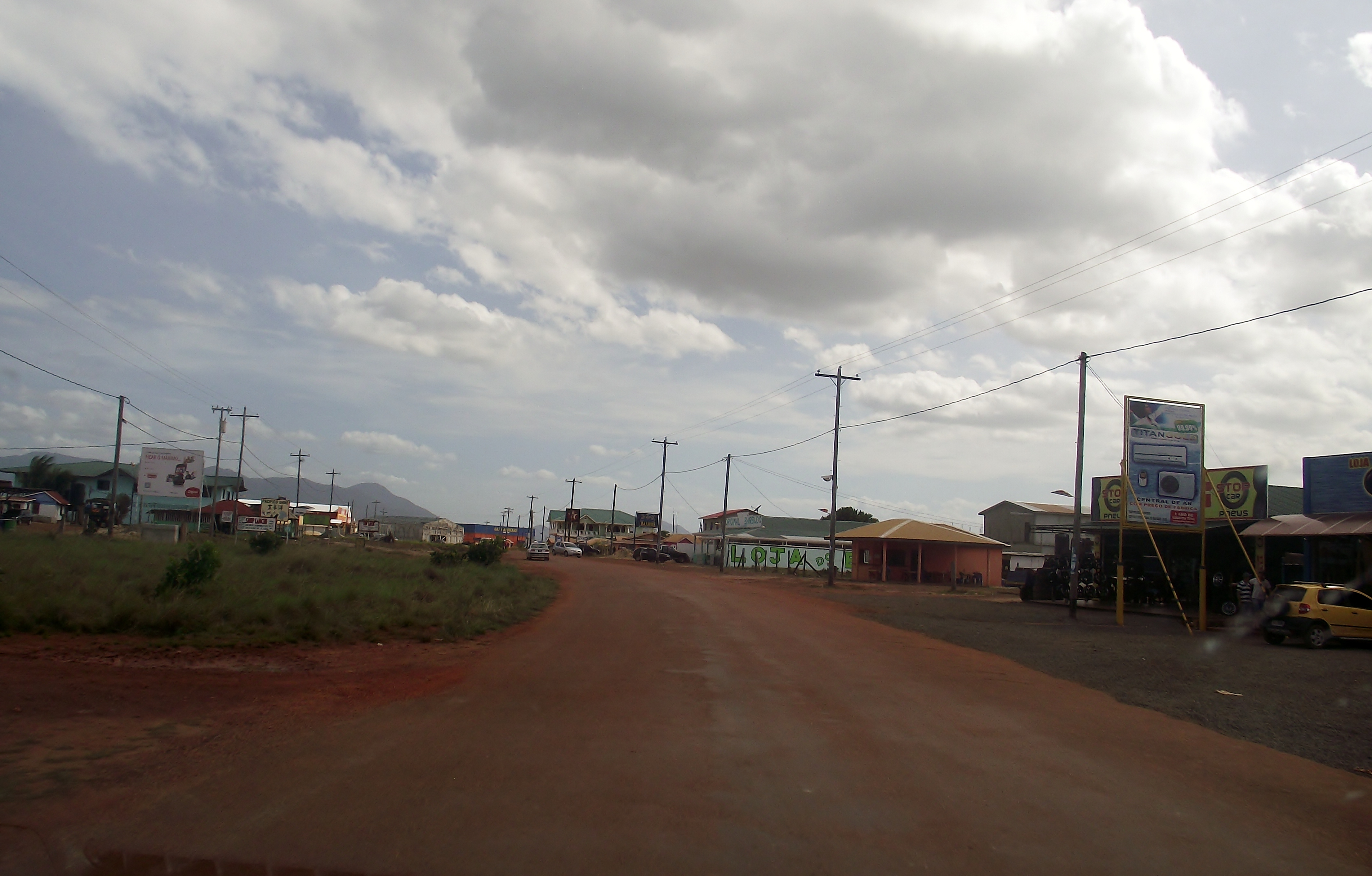 Lethem city, Guyana